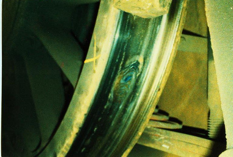 Auftragung an der Lauffläche eines Lokrades /Achse